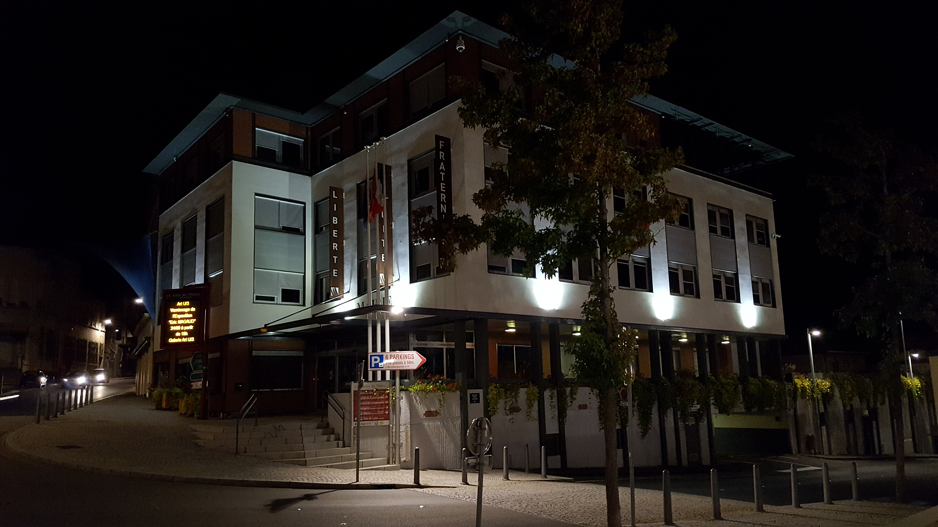 Mairie de Thiers la nuit.